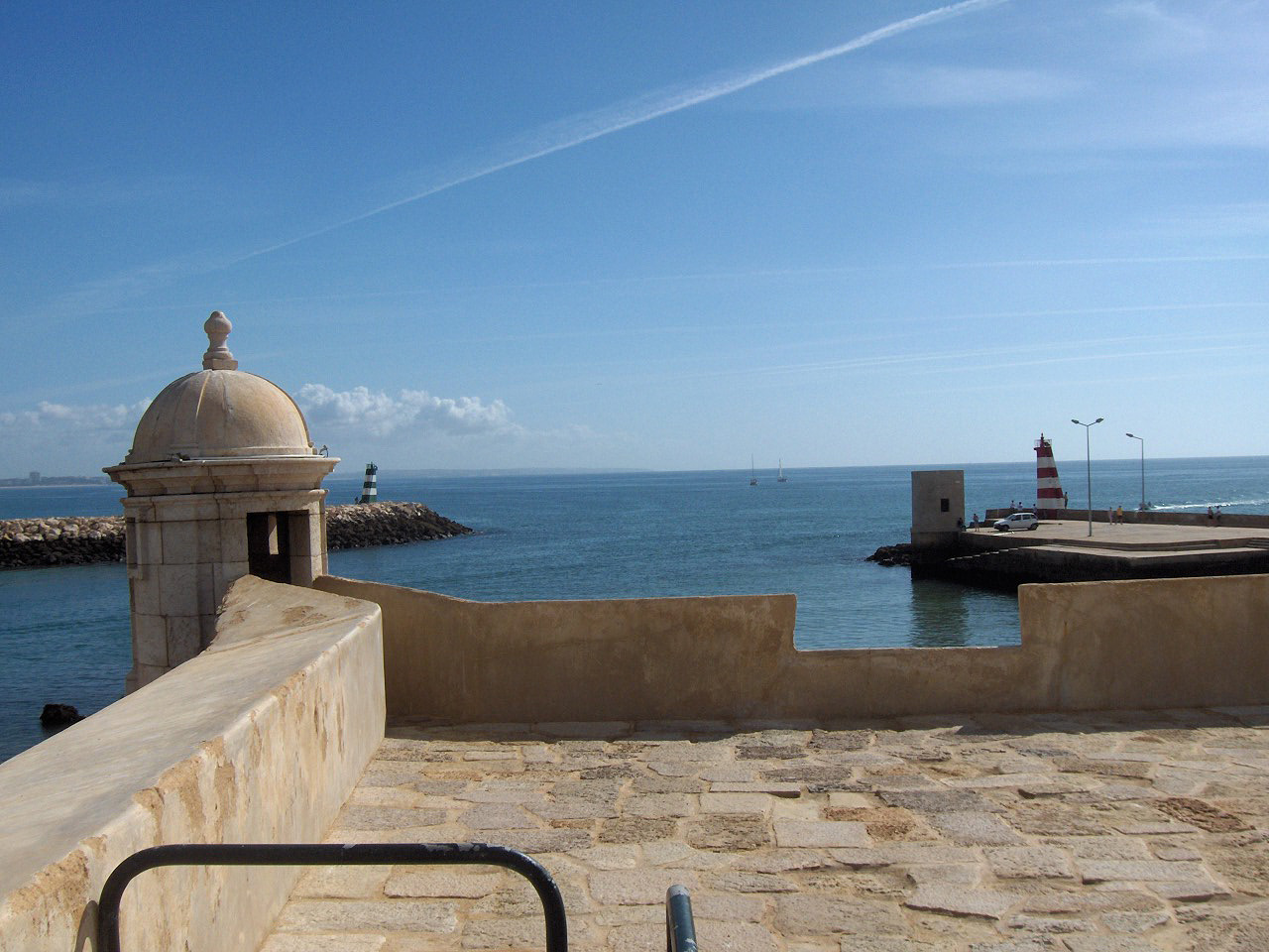 Watchtower; Forte da Ponta da Bandeira; Lagos, Portugal